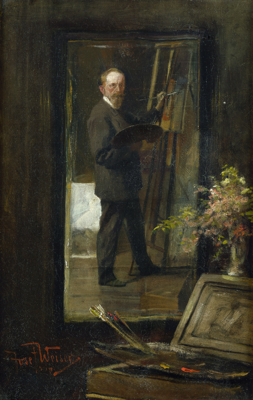 Selbstbildnis an der Staffellei.